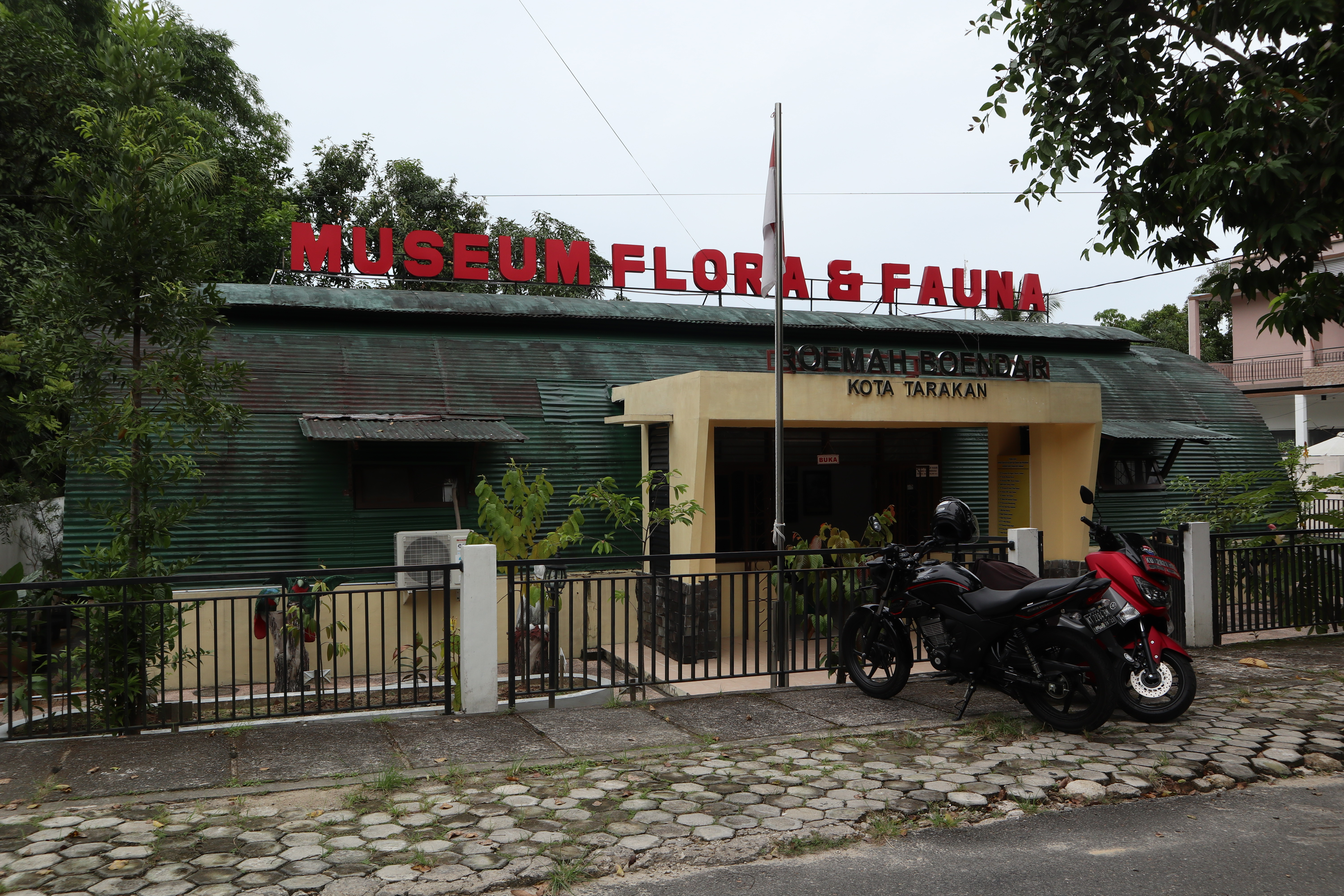 Museum Flora dan Fauna Kota Tarakan yang terletak di kawasan Pamusian.